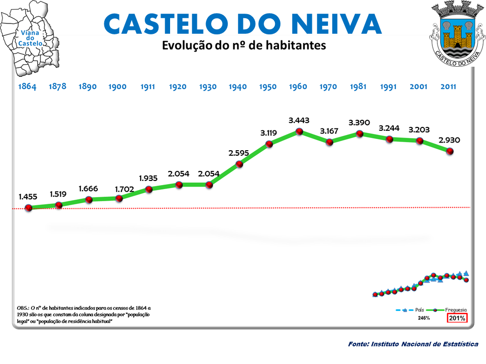 Censos 1864/2011